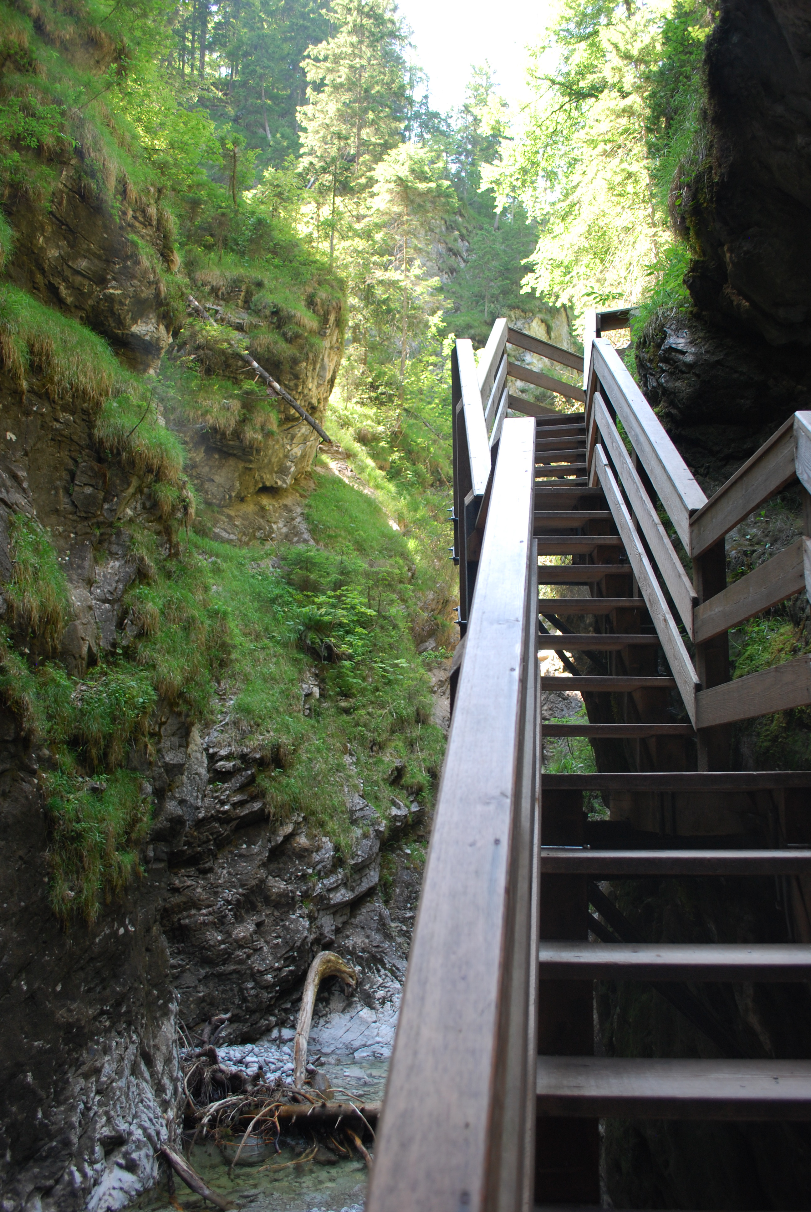 Trap Vordenkaserklamm